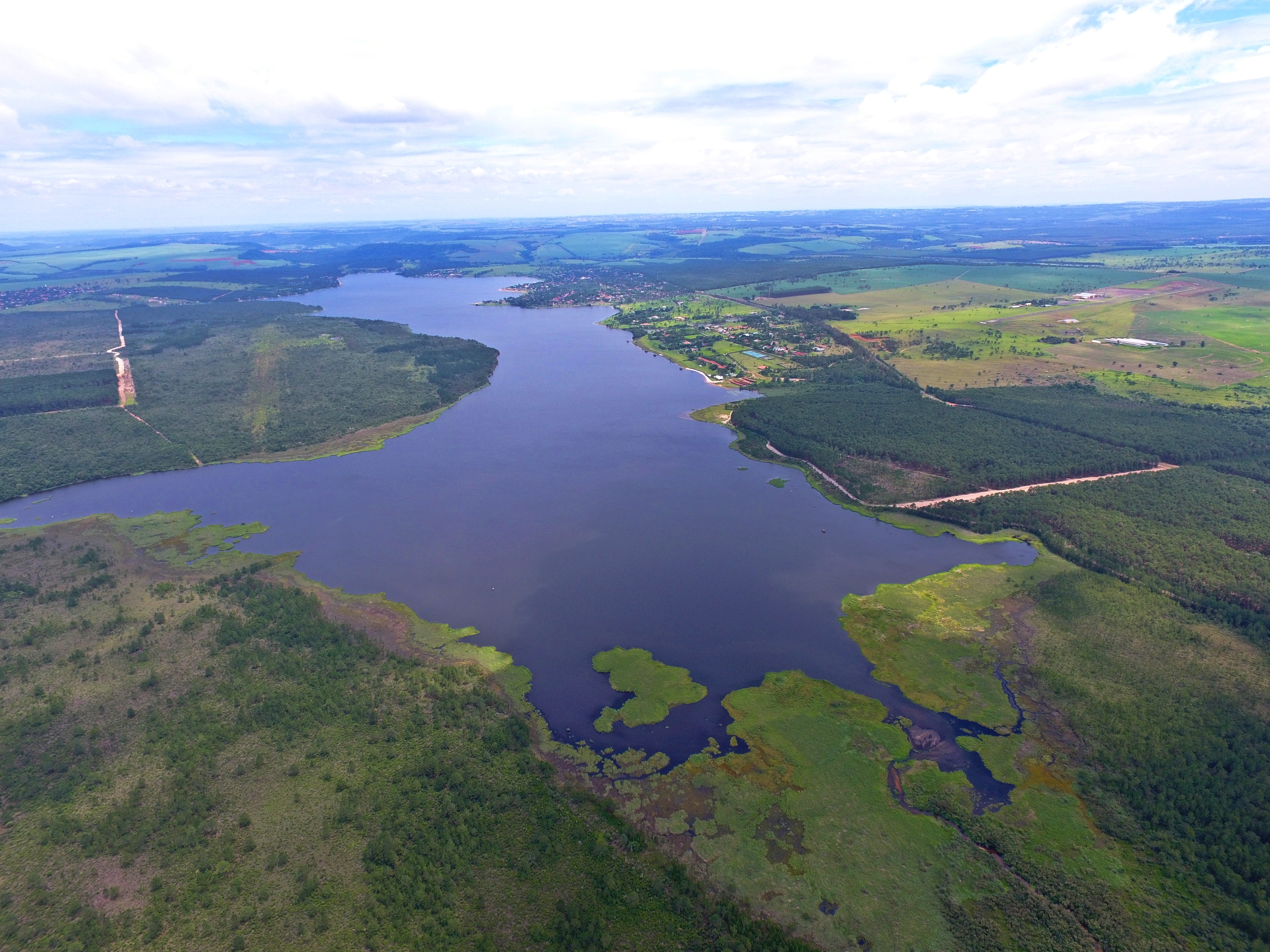 A Estação Ecológica de Itirapina é uma Unidade de Conservação de Proteção Integral. A represa do Broa localiza-se na extremidade norte, representando o marco divisório entre a área protegida e a ocupação humana.